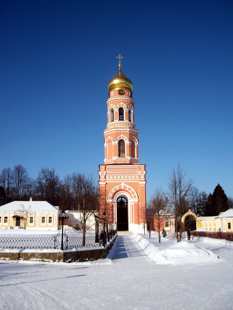 Вознесенская Давидова пустынь